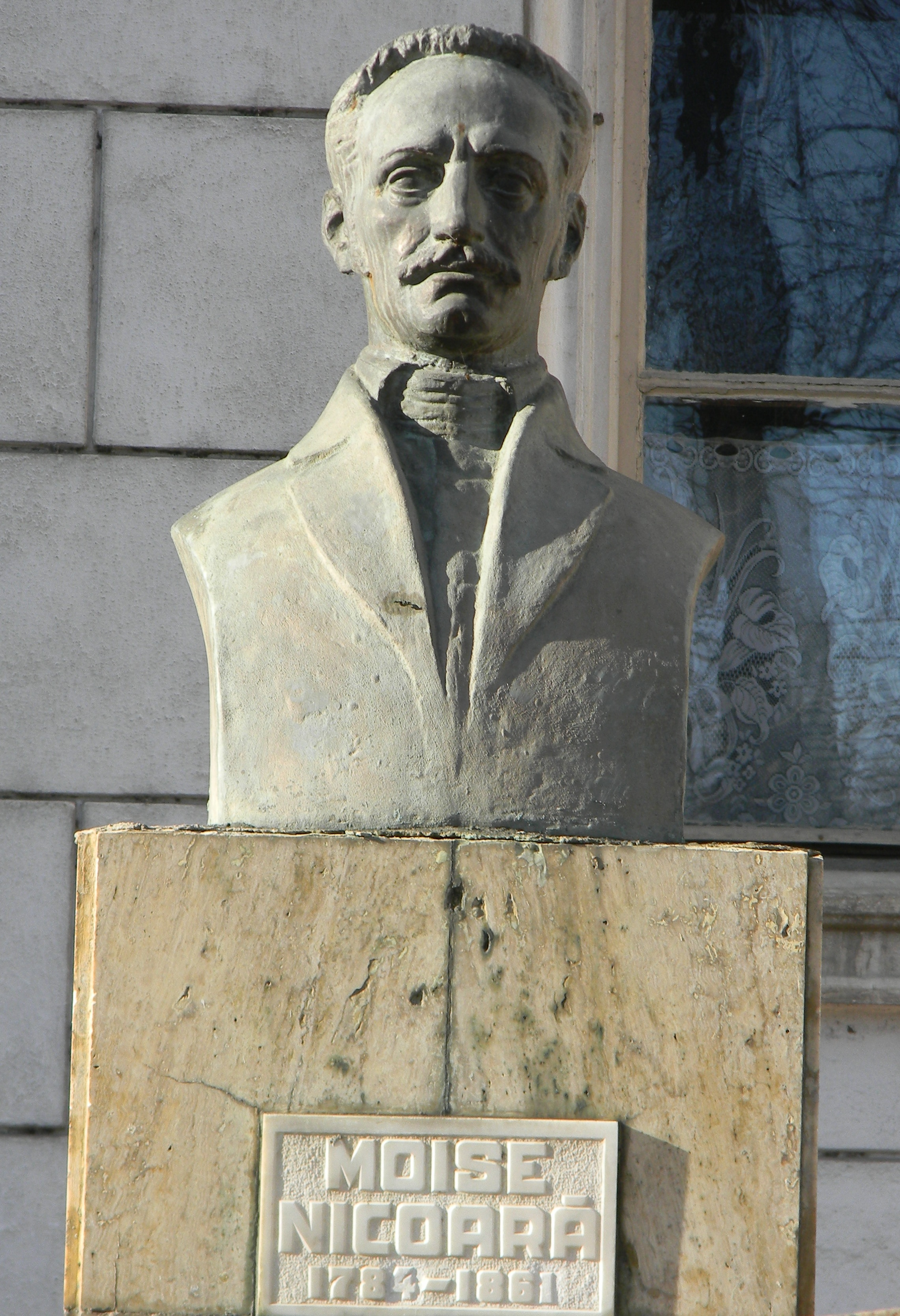 Bust Moise Nicoara - Arad